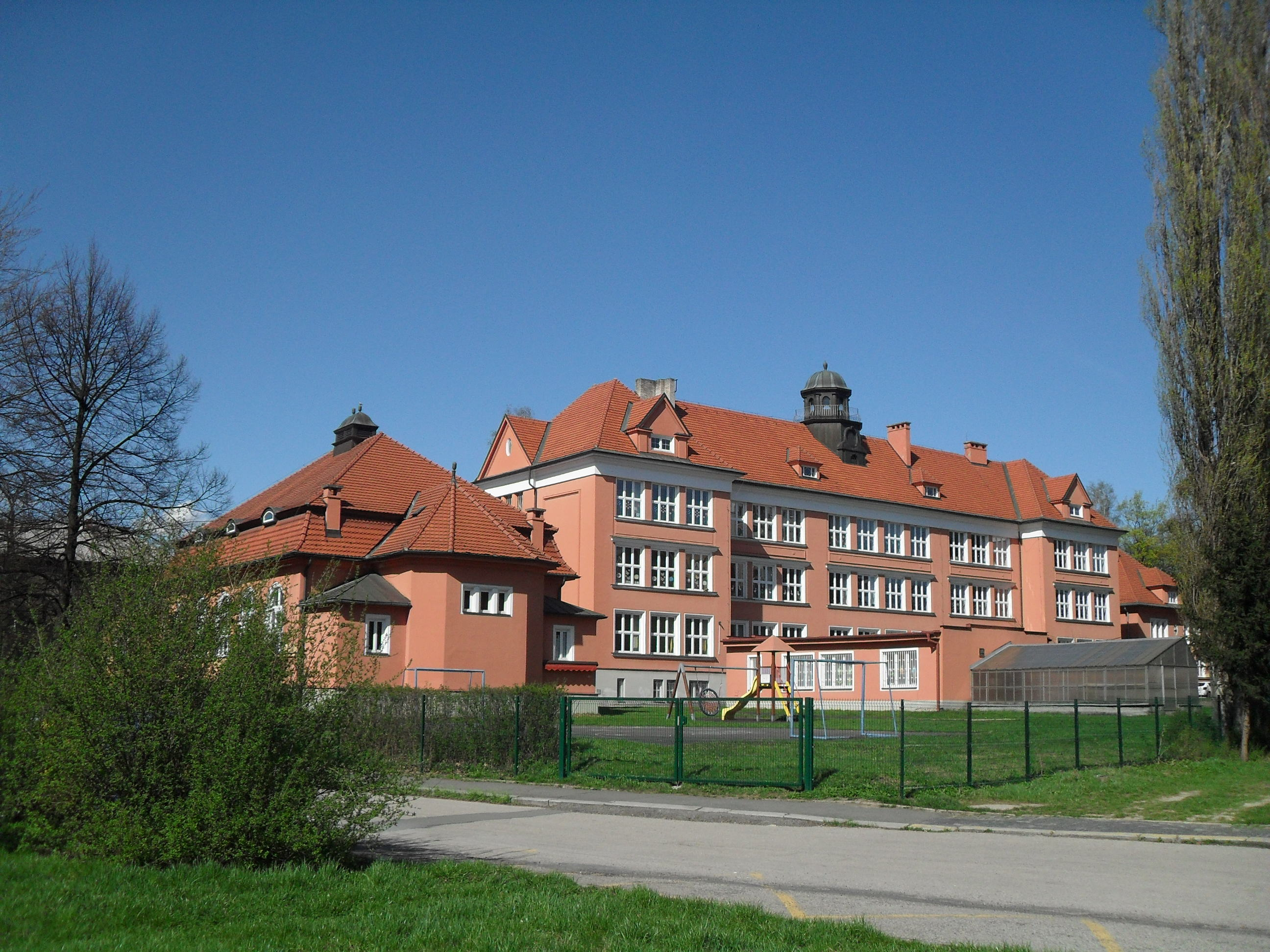 Centrum Karviné